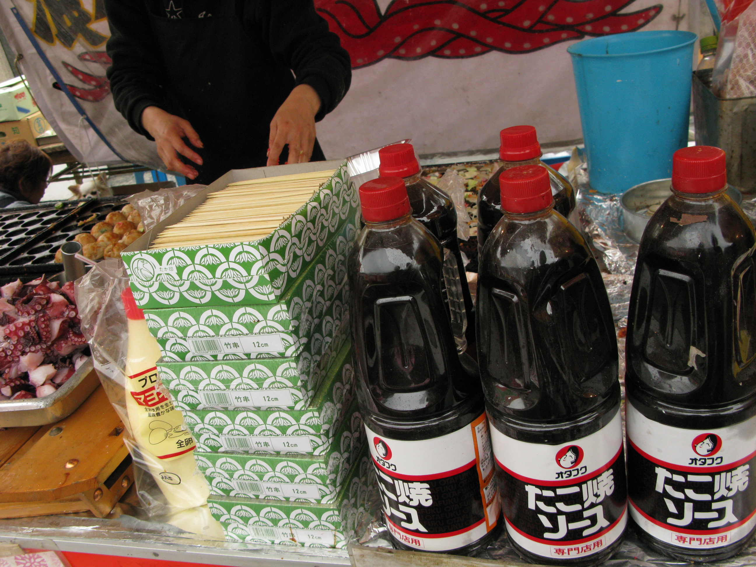 たこ焼き屋台（東京・台東区上野公園の上野恩賜公園）